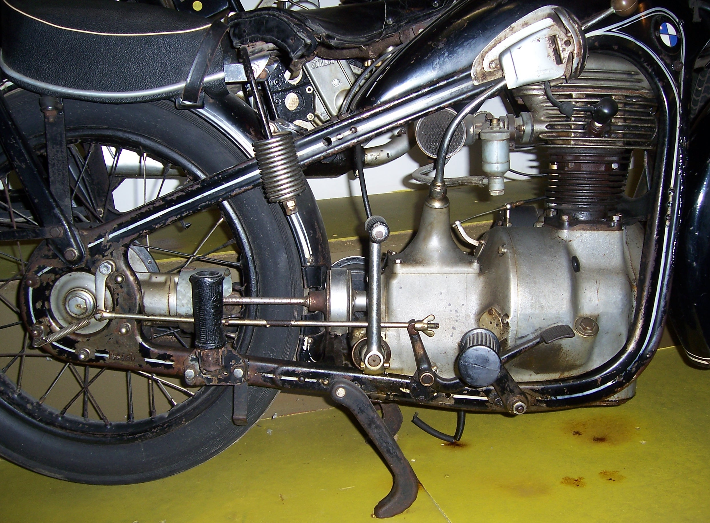 BMW R3 Fritz Busch Museum Wolfegg, Motor und Antrieb